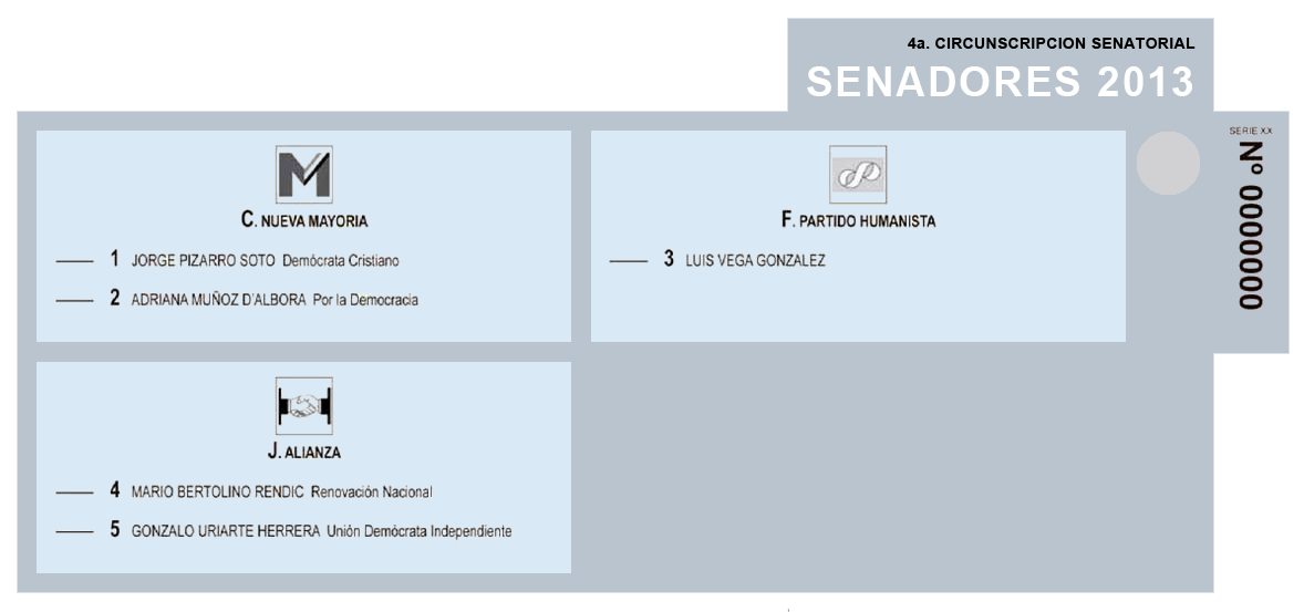 Reproducción de la cédula de votación utilizada en la Cuarta Circunscripción Senatorial (Coquimbo) para las elecciones parlamentarias de Chile de 2013.